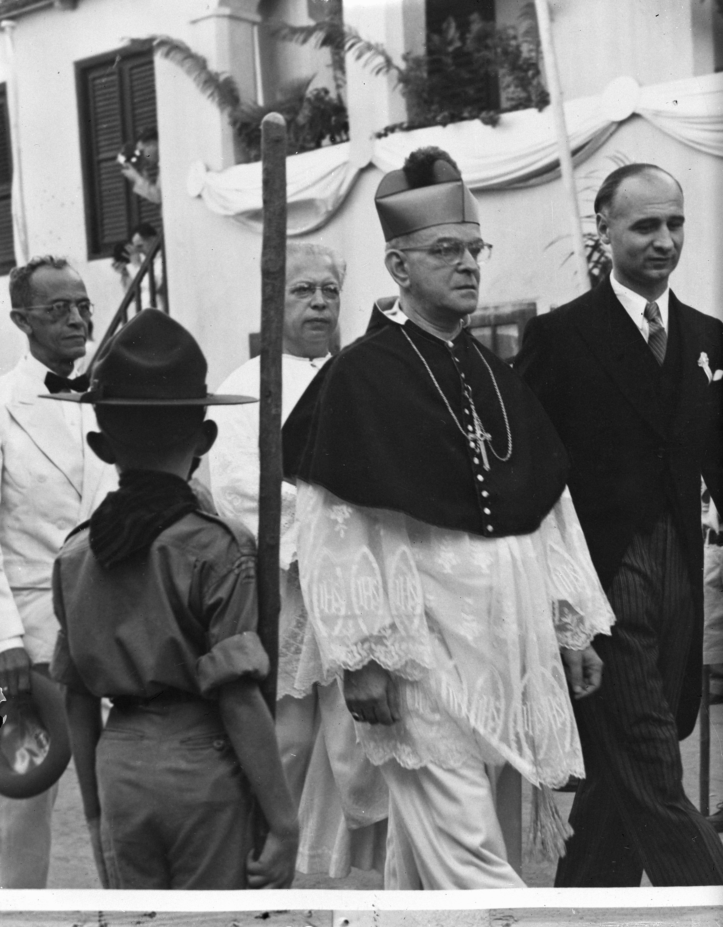 Collectie / Archief : Fotocollectie Anefo Reportage / Serie : [ onbekend ] Beschrijving : Bisschopswijding Mgr. A. Van der Veen Teppewoldt te Curacao Datum : 5 januari 1949 Locatie : Curacao Fotograaf : Foto Fischer Auteursrechthebbende : Nationaal Archief Materiaalsoort : Glasnegatief Nummer archiefinventaris : bekijk toegang 2.24.01.09 Bestanddeelnummer : 903-1773 Reacties Geplaatst door Reuben Maduro op 18 mei 2012 - 22:37. Teppewoldt? De naam van de beste man was: van der Veen Zeppenfeldt (Aruba 11 oktober 1891, Curaçao 4 juli 1957).